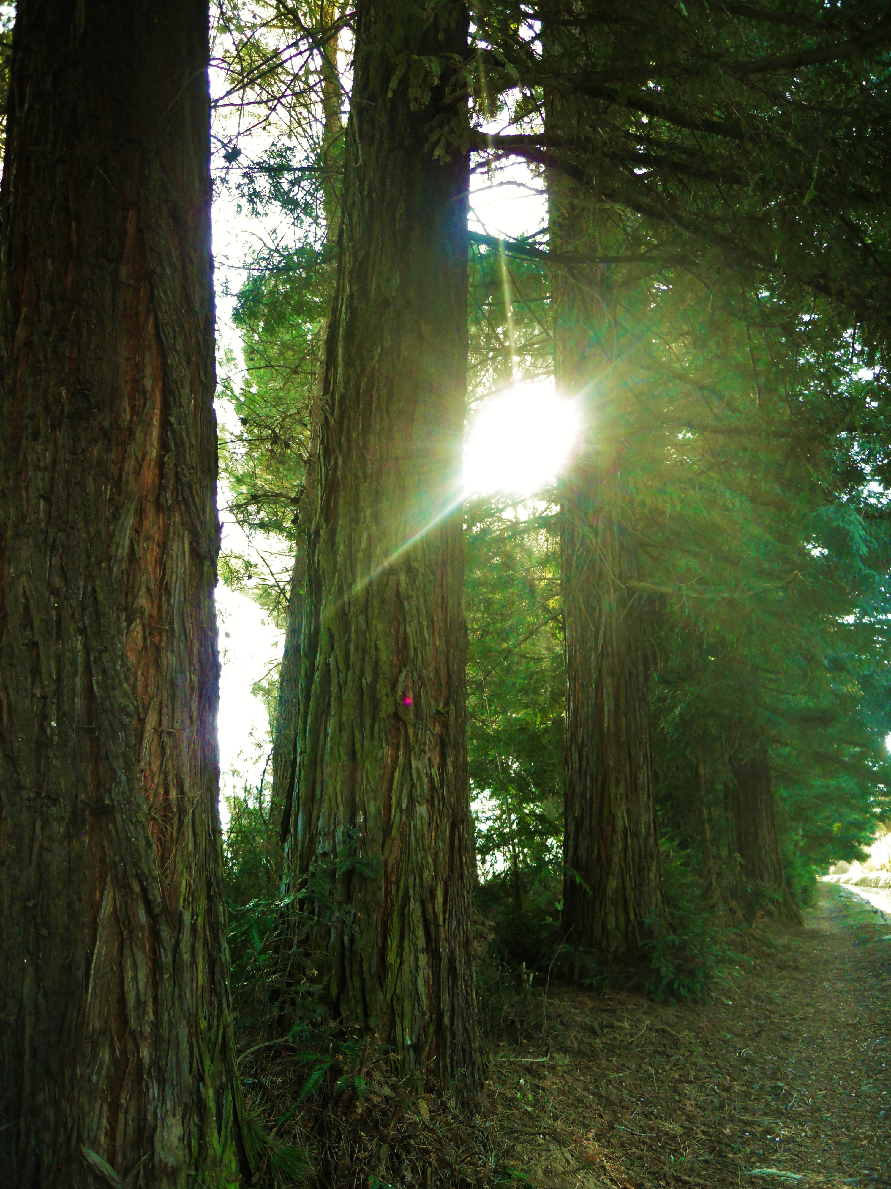 Sequoyas en Tudela